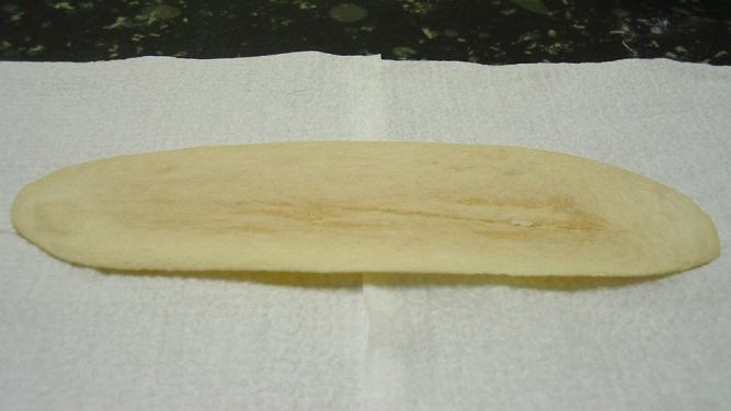 中文（台灣）: 宜蘭牛舌餅